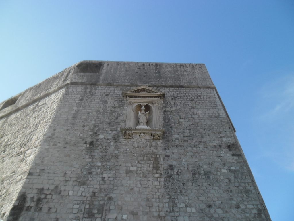 Fort Lovrijenac